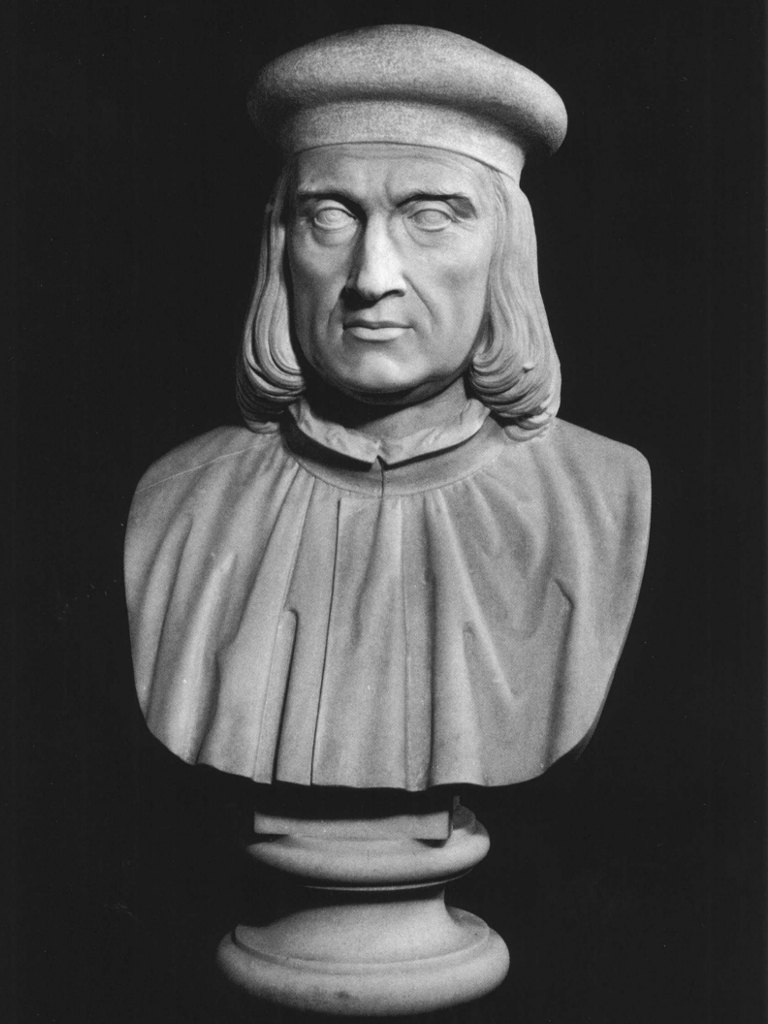 Il busto fa parte del Panteon Veneto, conservato presso Palazzo Loredan di Campo Santo Stefano a Venezia.